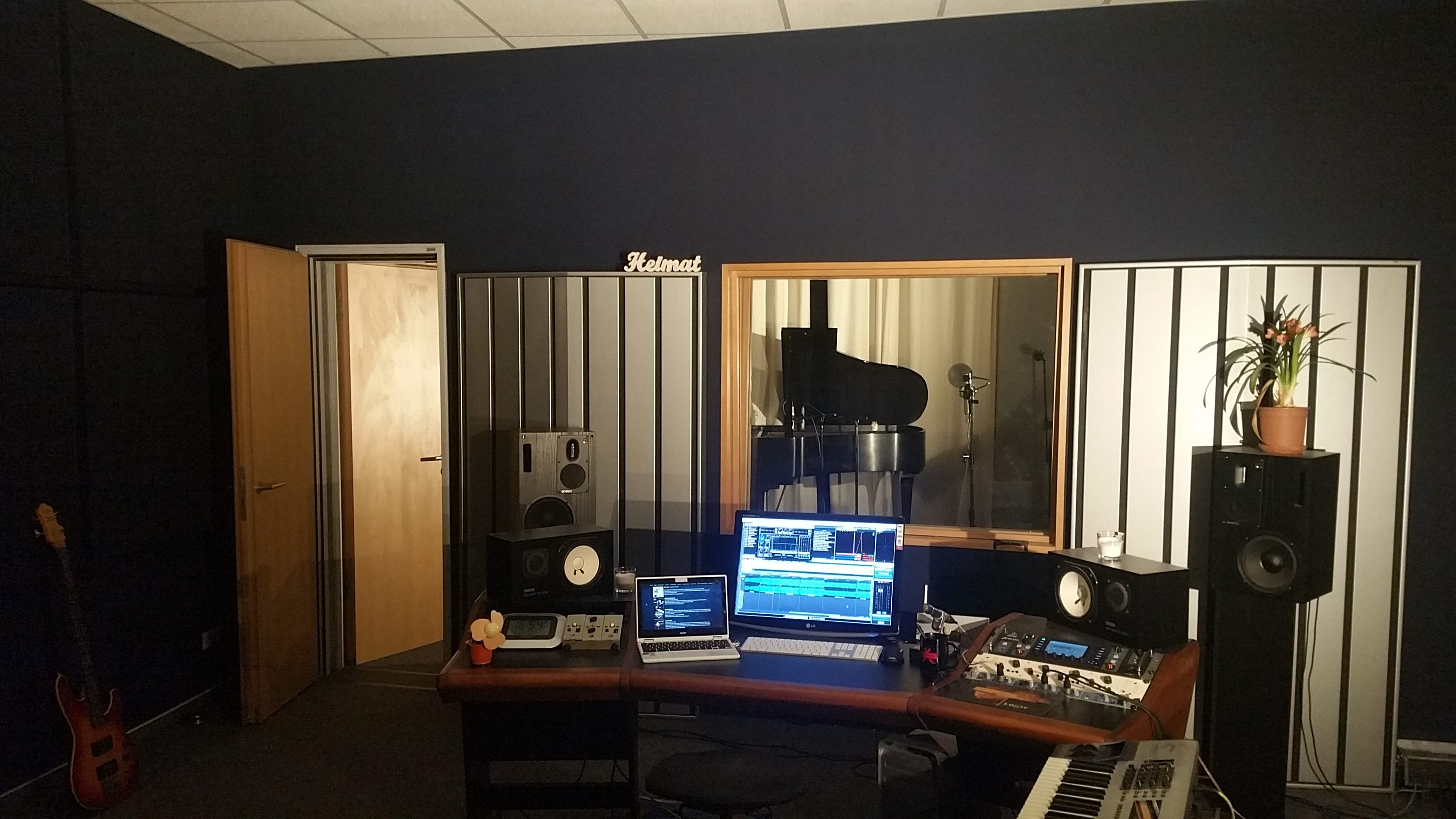 Regieraum Studio1058